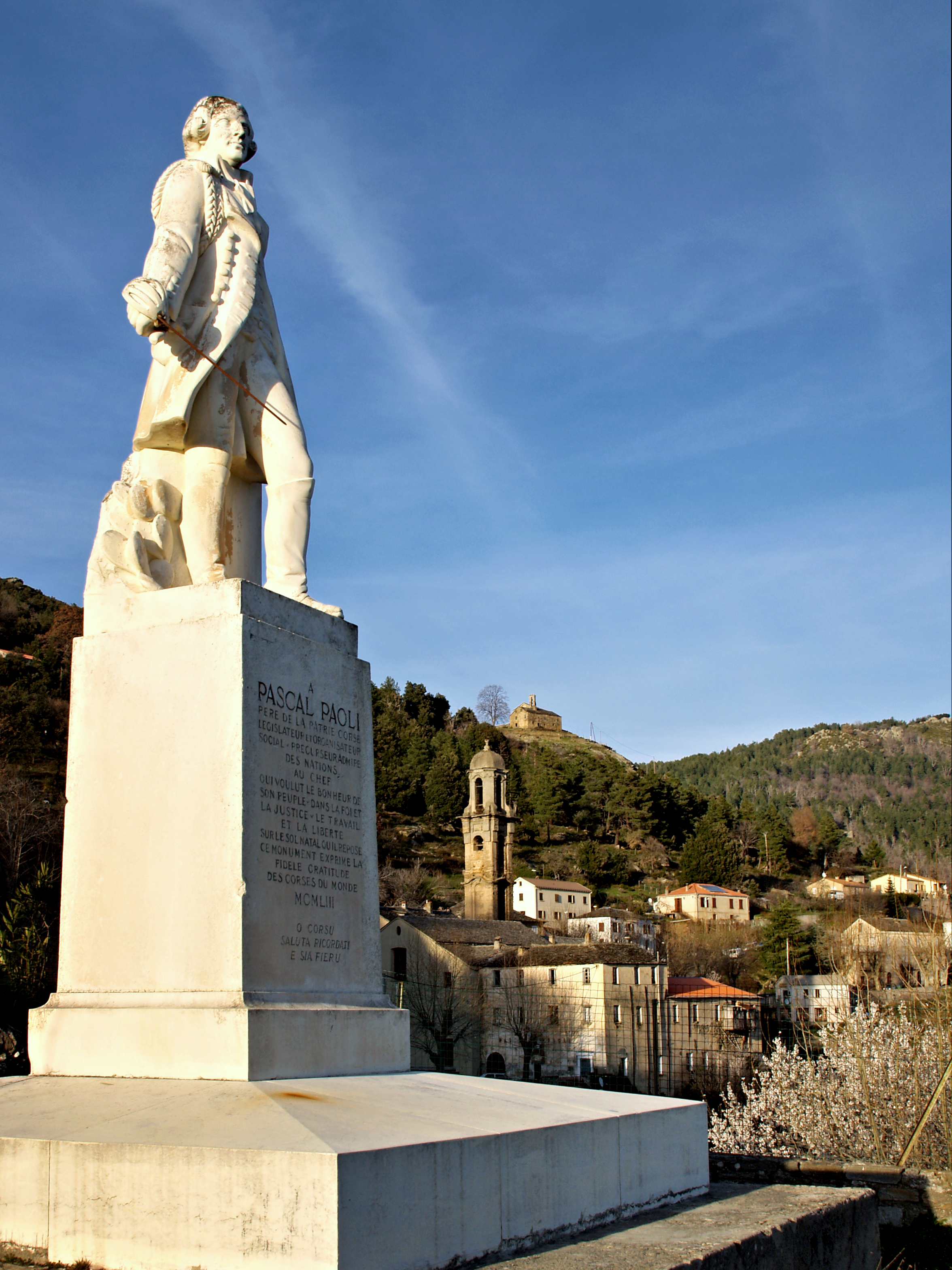 Morosaglia (Corse) - Pascal Paoli